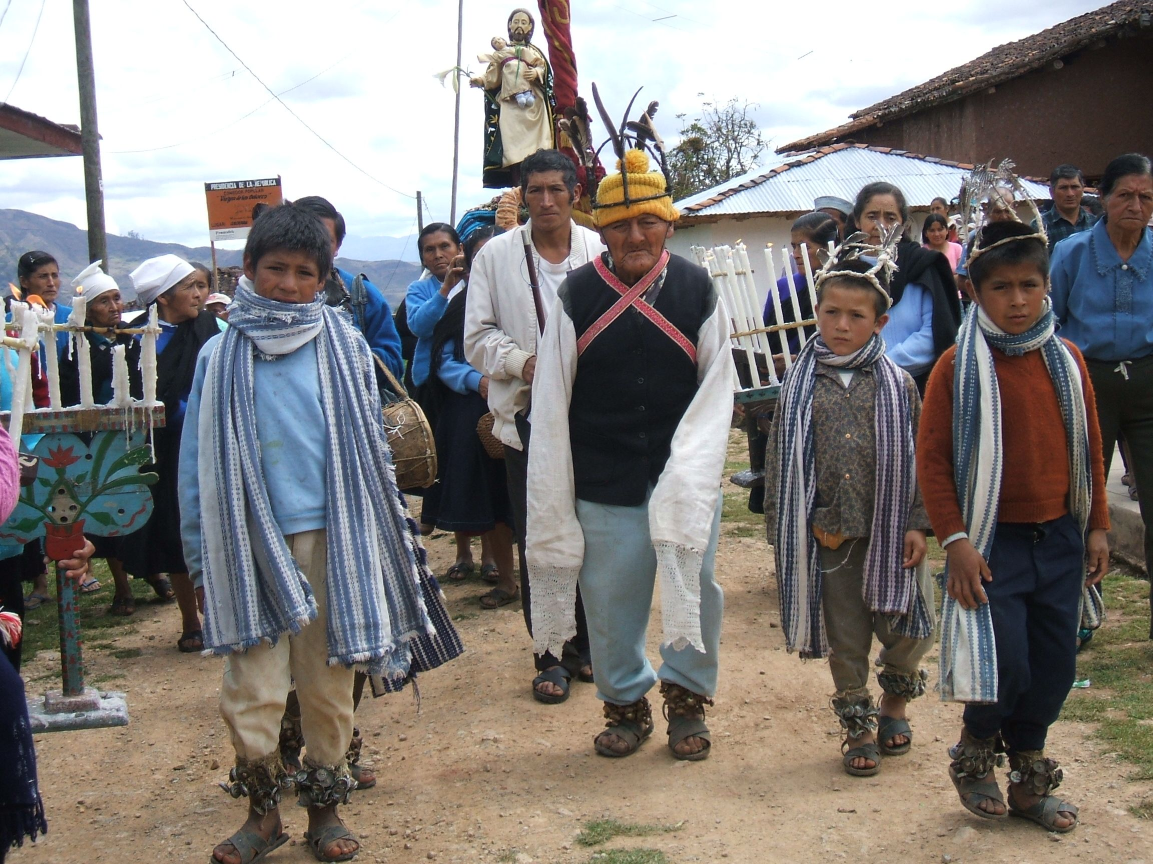 danzantes y patrón San José de Colcamar